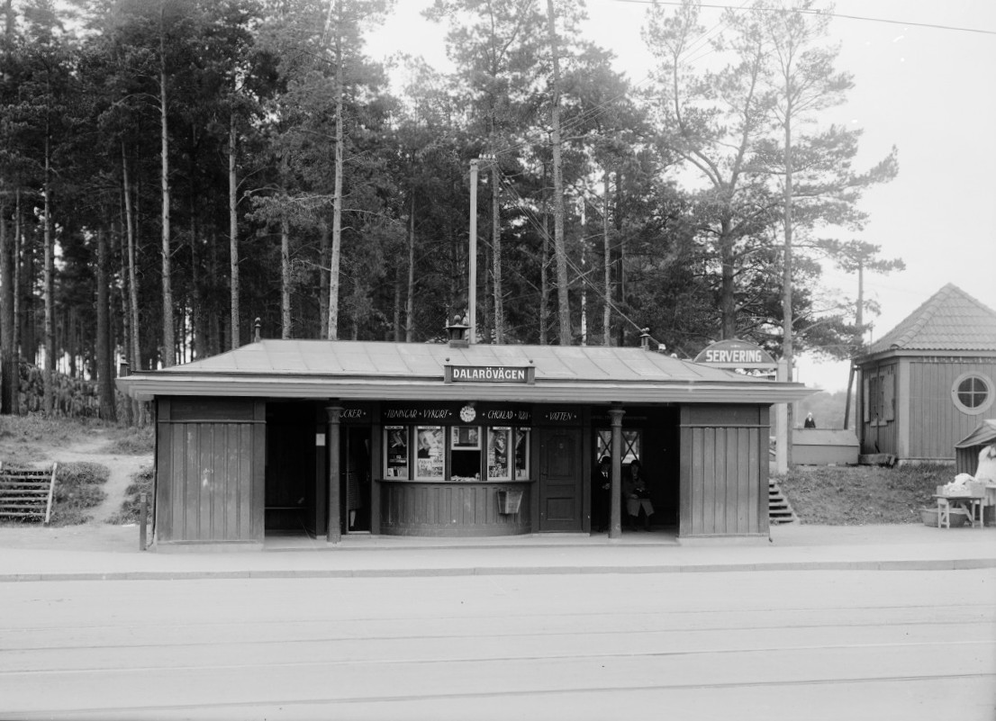 Spårvagnshållplats "Dalarövägen" i Enskede